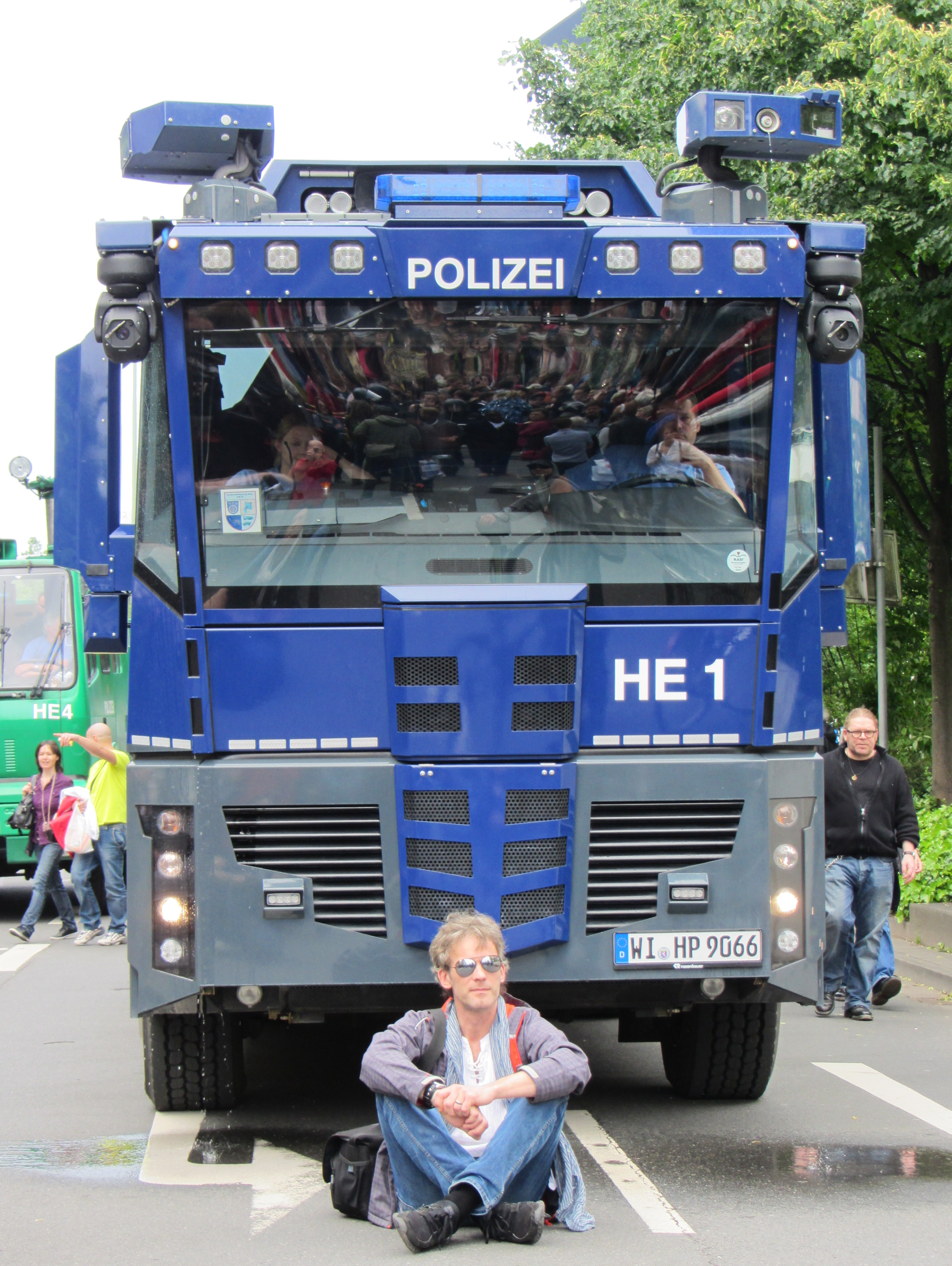 Blockupy 2013: Demonstrant vor Wasserwerfer